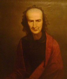 Obra da coleção Brasiliana Iconográfica.